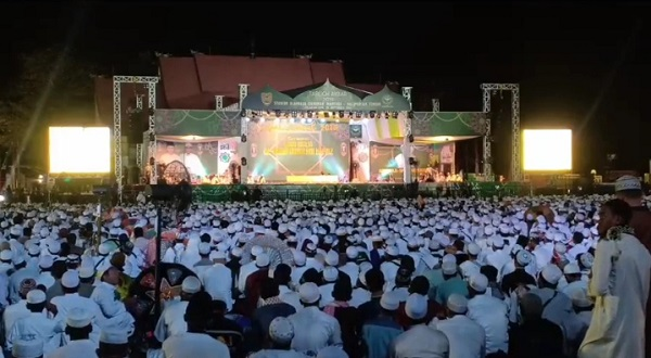 Suasana di stadion Sanaman Mantikei, Palangkaraya saat acara Habib Umar.